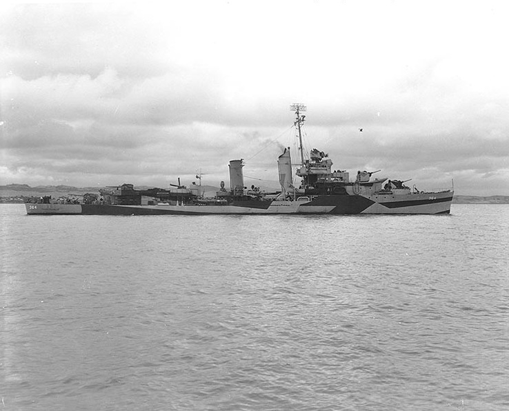 USS Mahan (DD-364) mit Tarnanstrich